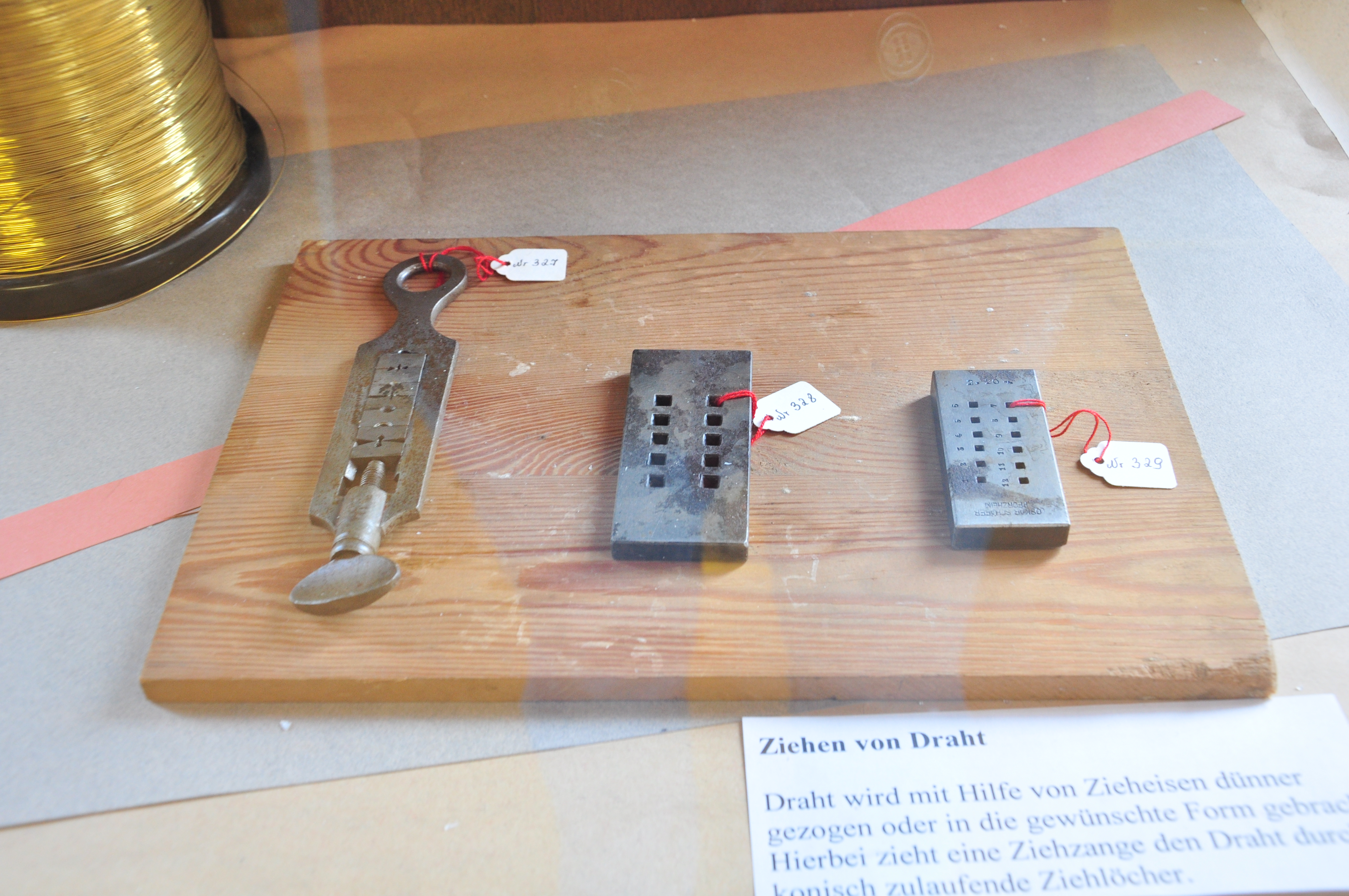 Zieheisen zum ausziehen von Draht